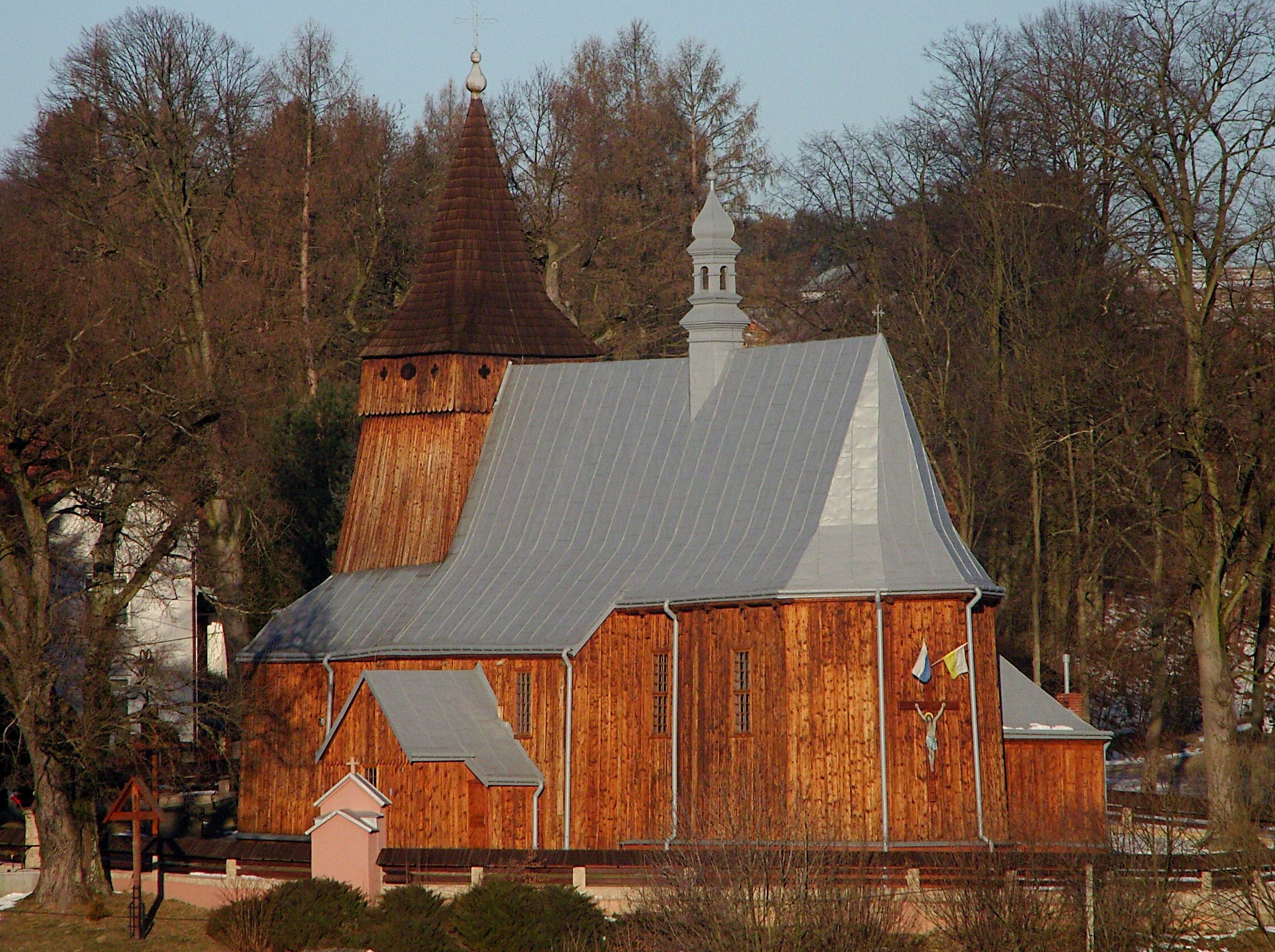 Kościół św. Anny w Święcanach wzniesiony w 1520 roku, kilkukrotnie przebudowany i powiększony, w tym w XIX wieku